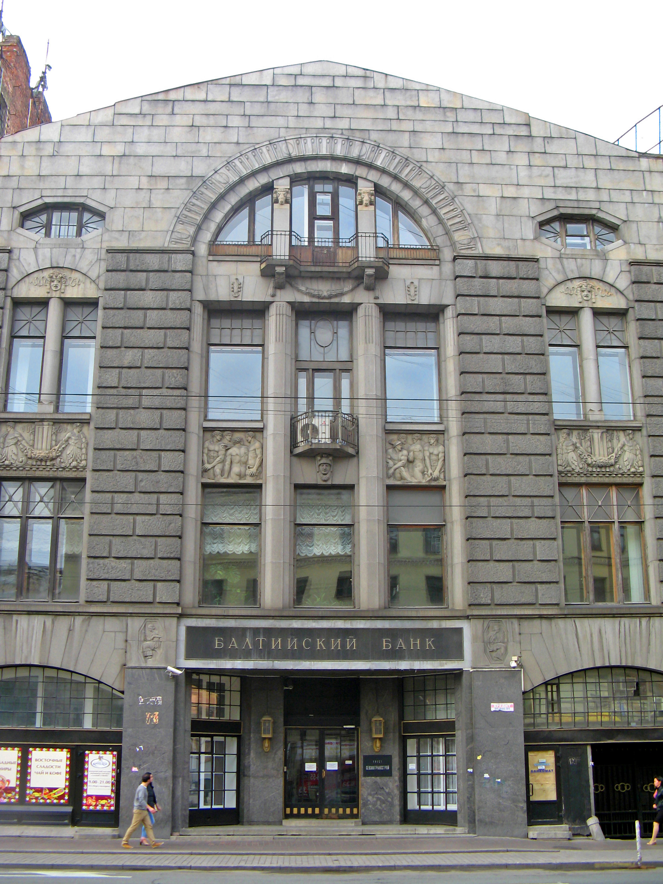 Дом Второго Общества взаимного кредита с флигелями: улица Садовая, 34, Центральный район, Санкт-Петербург